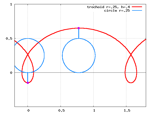 трохоида при , (удлинённая циклоида)